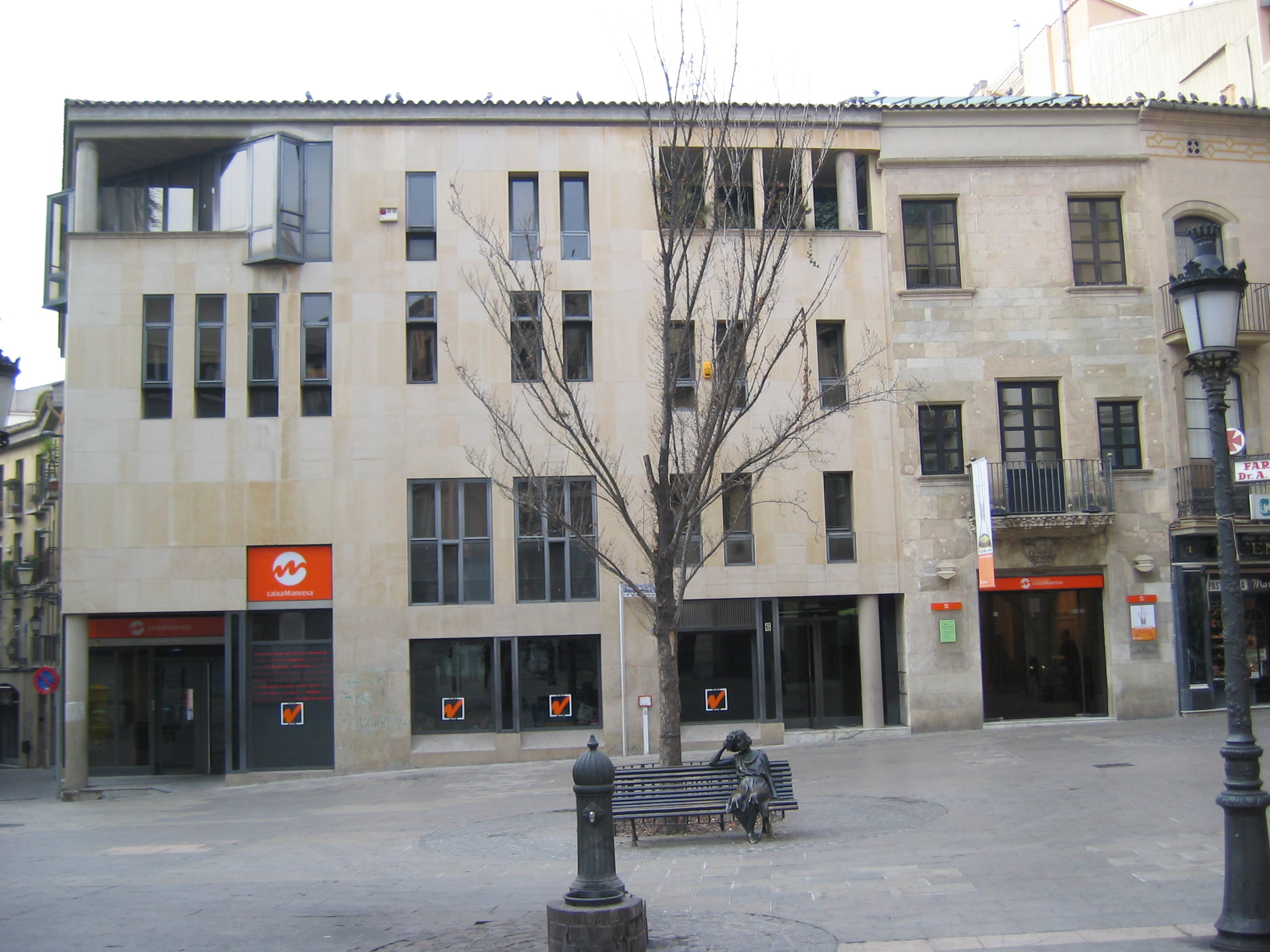 Seu: Manresa, pl. de l'Om, 6